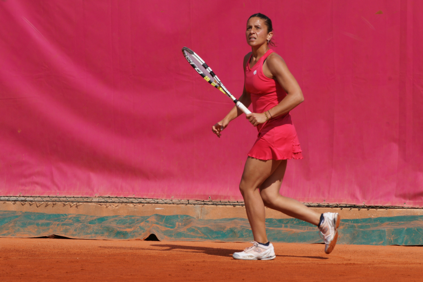 Anna Floris , Open ITF Cagnes-sur-Mer 2012